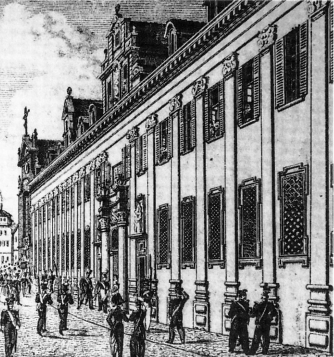 Fassade des Deutschhofs in Heilbronn. Lithographie der Gebrüder Wolff (Ausschnitt)